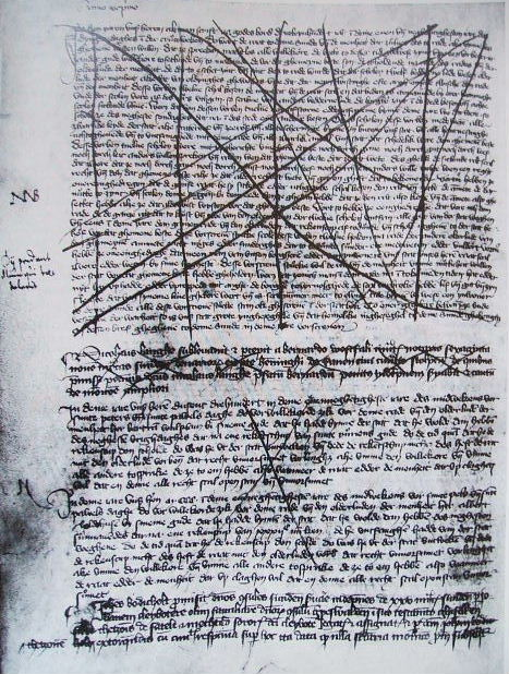 Das Bild zeigt eine Seite des Stralsunder Stadtbuches "Liber memorialis", 1391. In mittelhochdeutscher Sprache ist die Stadtverfassung von Karsten Sarnow niedergeschrieben, sie wurde durchgestrichen. Das Bild stammt von einem unbekannten Künstler. Dieses Foto wurde aus dem Buch "Geschichte der Stadt Stralsund" von Herbert Ewe, S. 33, abfotografiert.